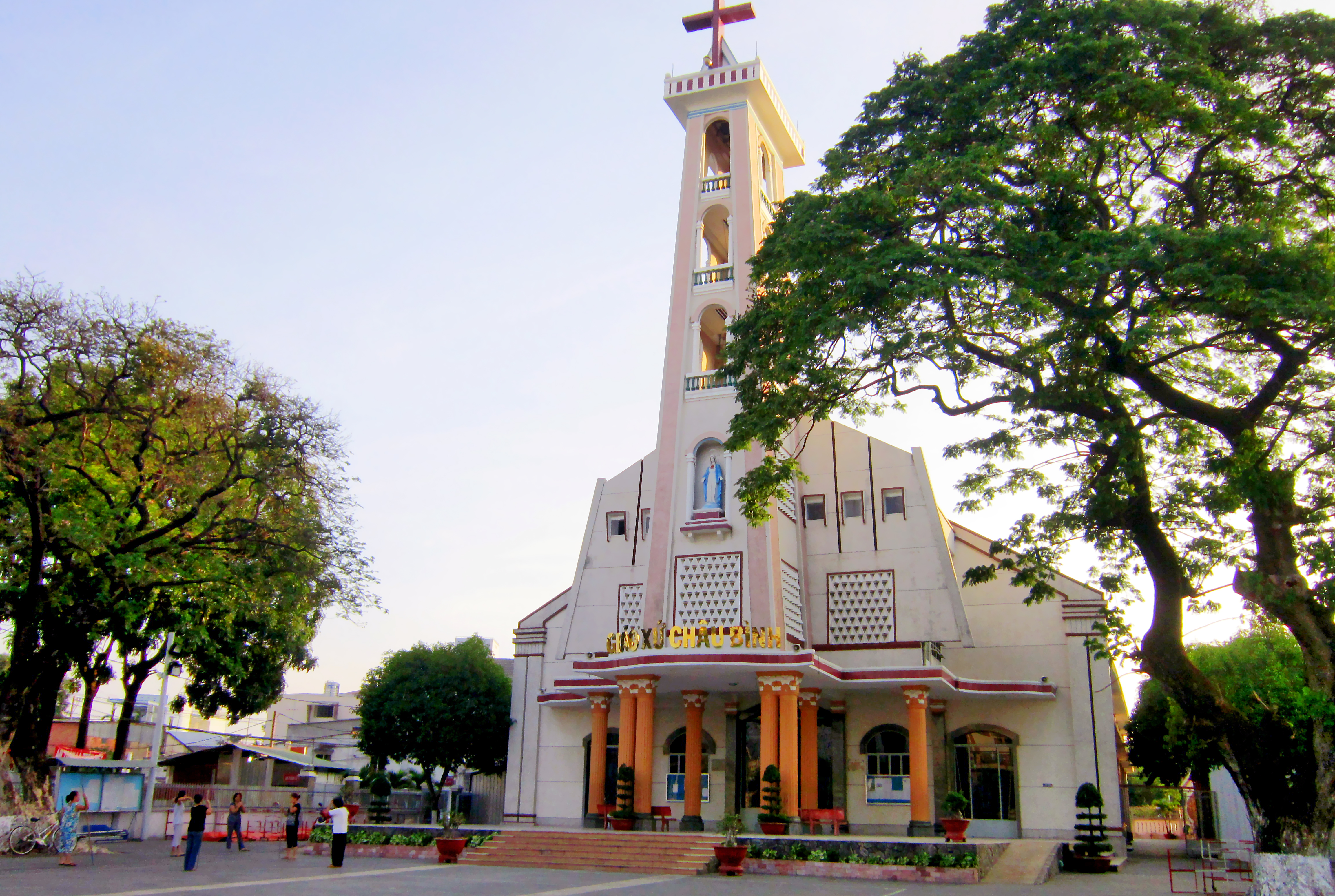 Nhà thờ Giáo xứ Châu Bình ở phường Tam Phú, quận Thủ Đức, TP. Hồ Chí Minh, Việt Nam